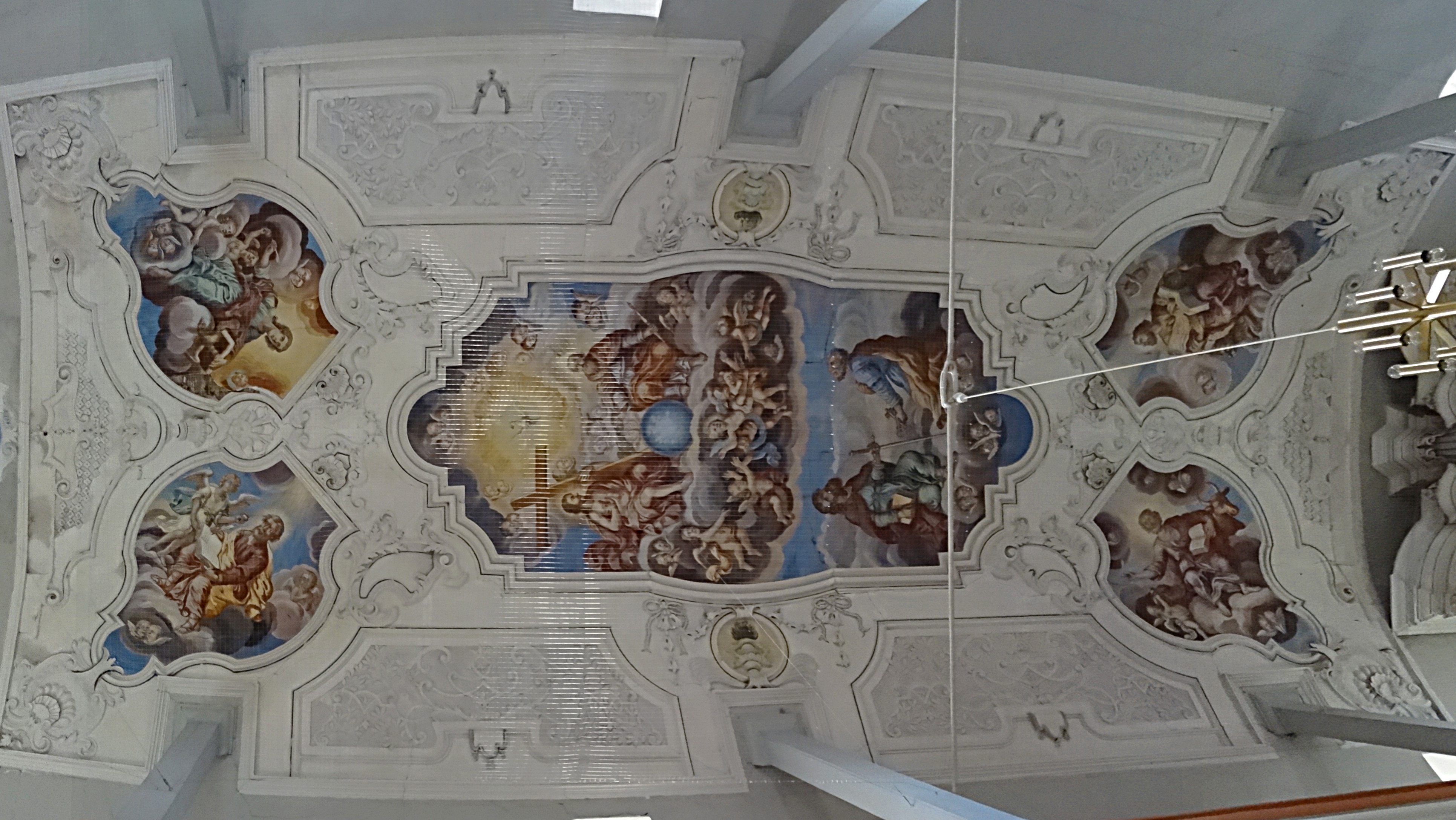 Deckengemälde aus der Rokokozeit in St. Peter und Paul (Andisleben)